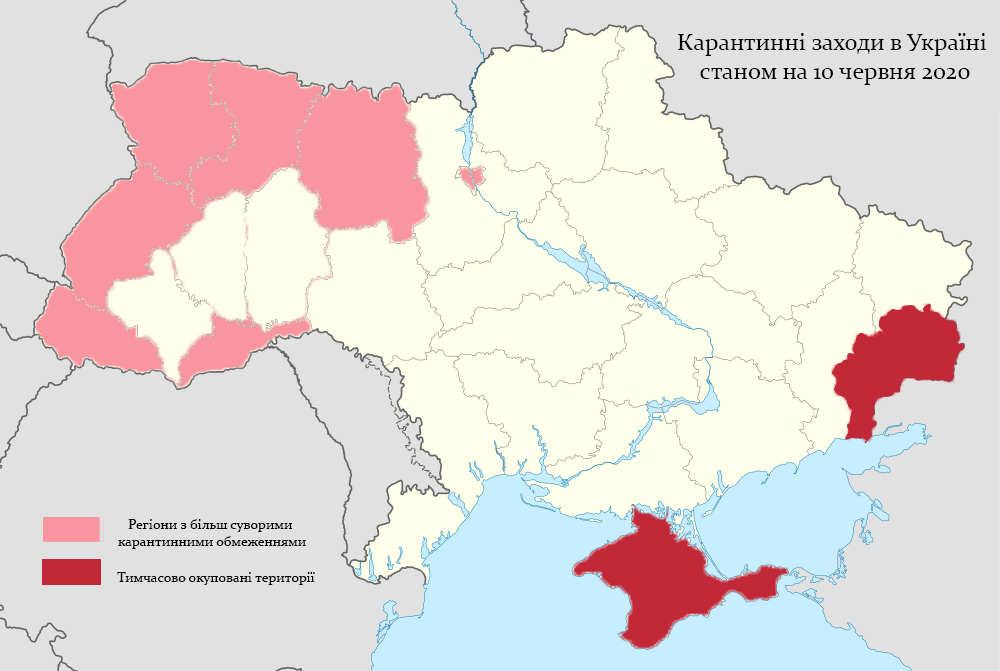 Карантин в Україні станом на 10 червня 2020, джерело даних - [1]